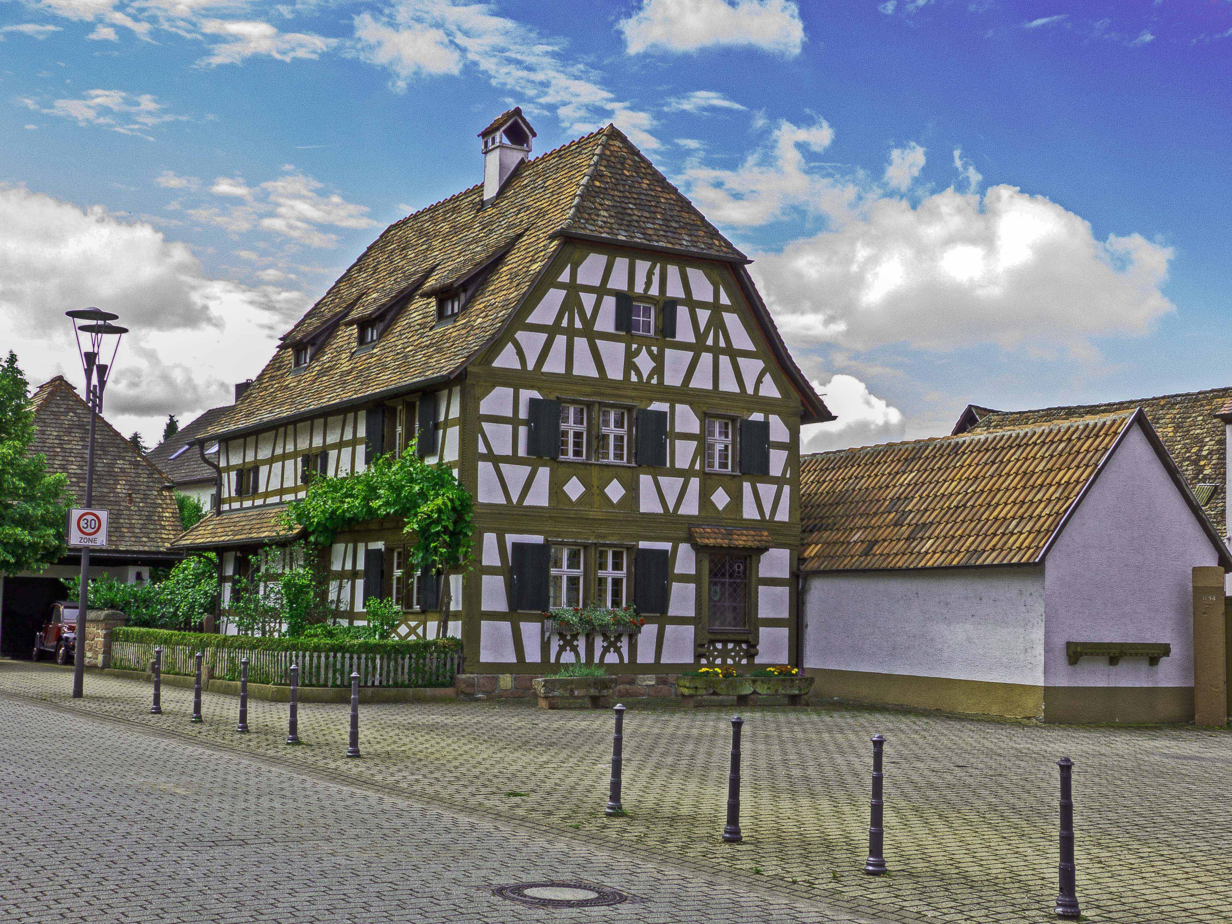 spätbarockes Fachwerkhaus, bezeichnet 1760